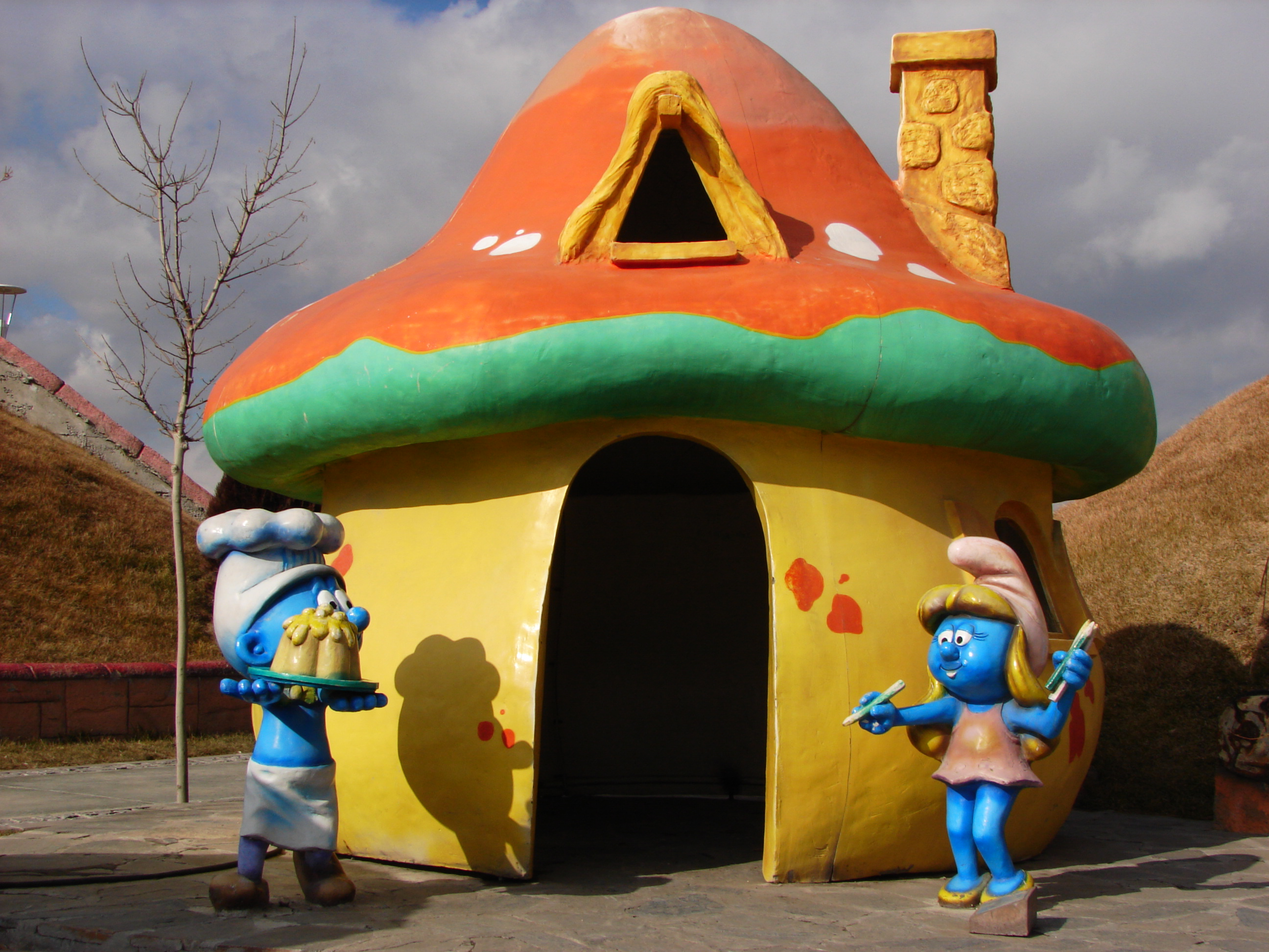 Ankara Amusement Park